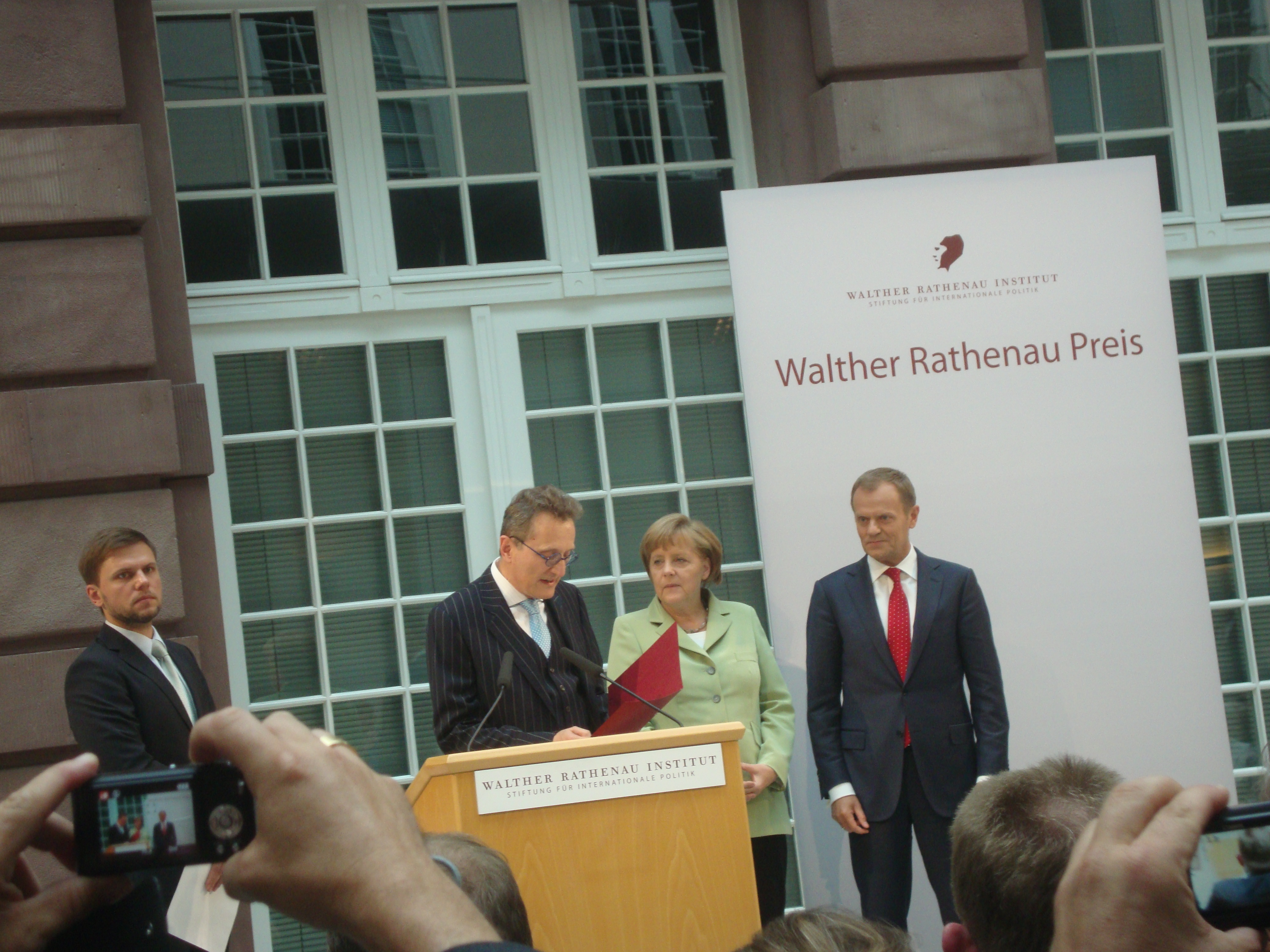 Donald Tusk wurde 2012 der Walther Rathenau Preis verliehen, die Laudation hielt Angela Merkel